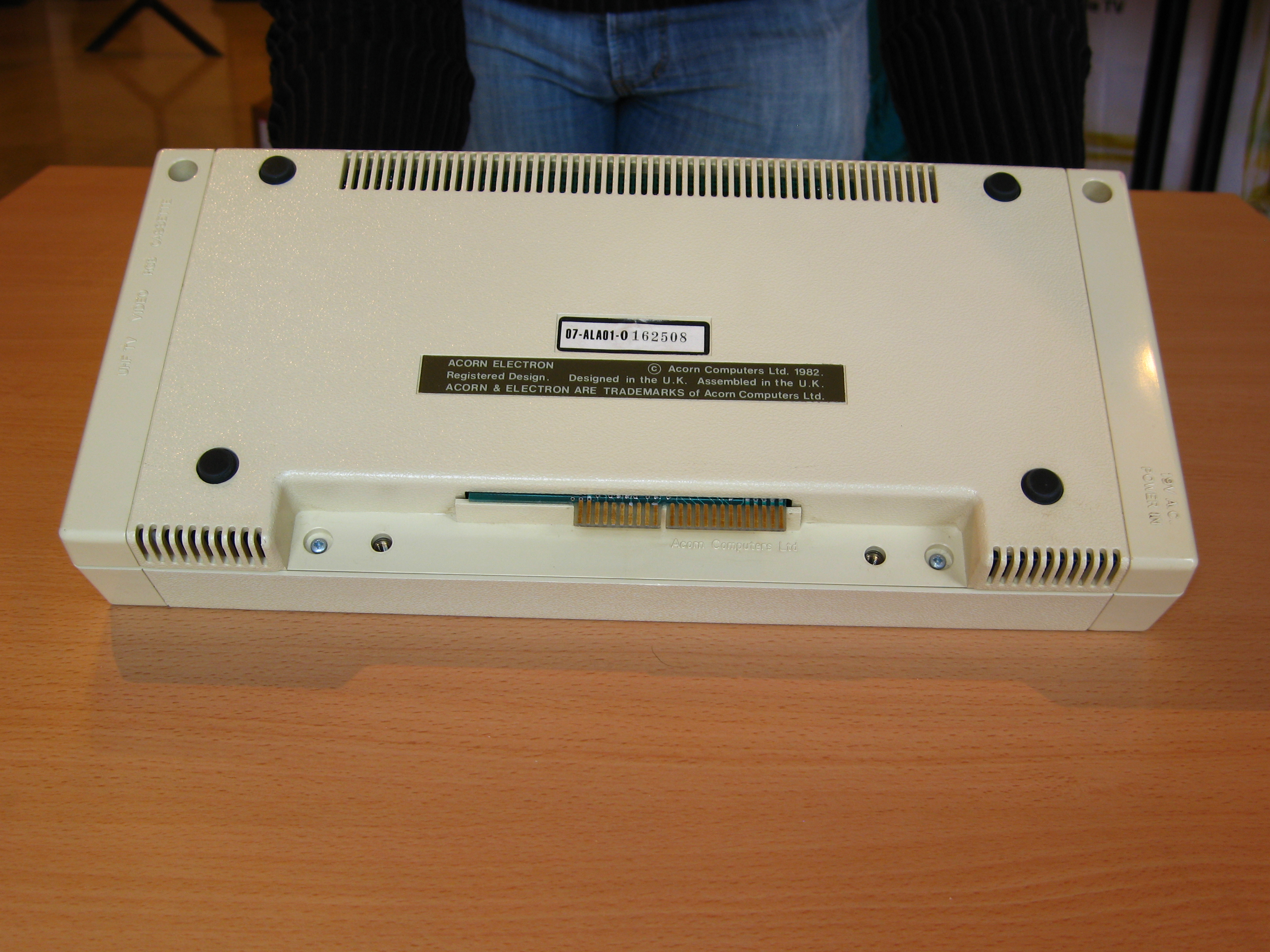 Ordenador doméstico Acorn Electron, vista inferior, en la MadriSX & Retro 2007